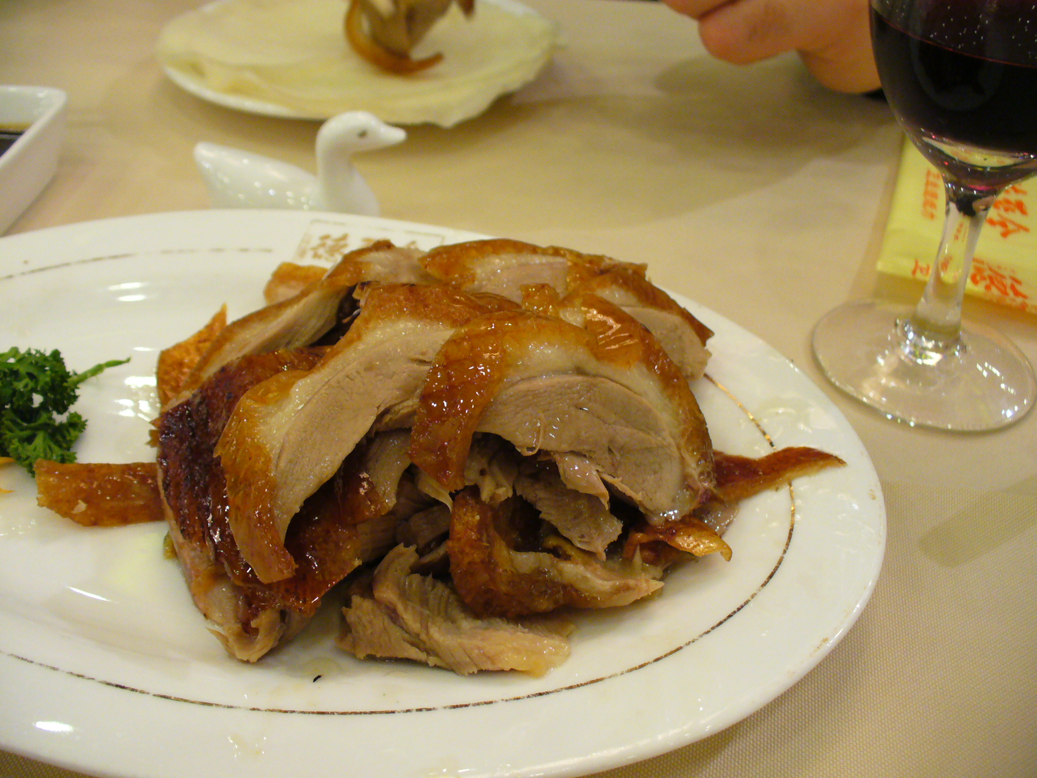 tranche de canard lacquais fraichement decoupé dans un restaurant de peking